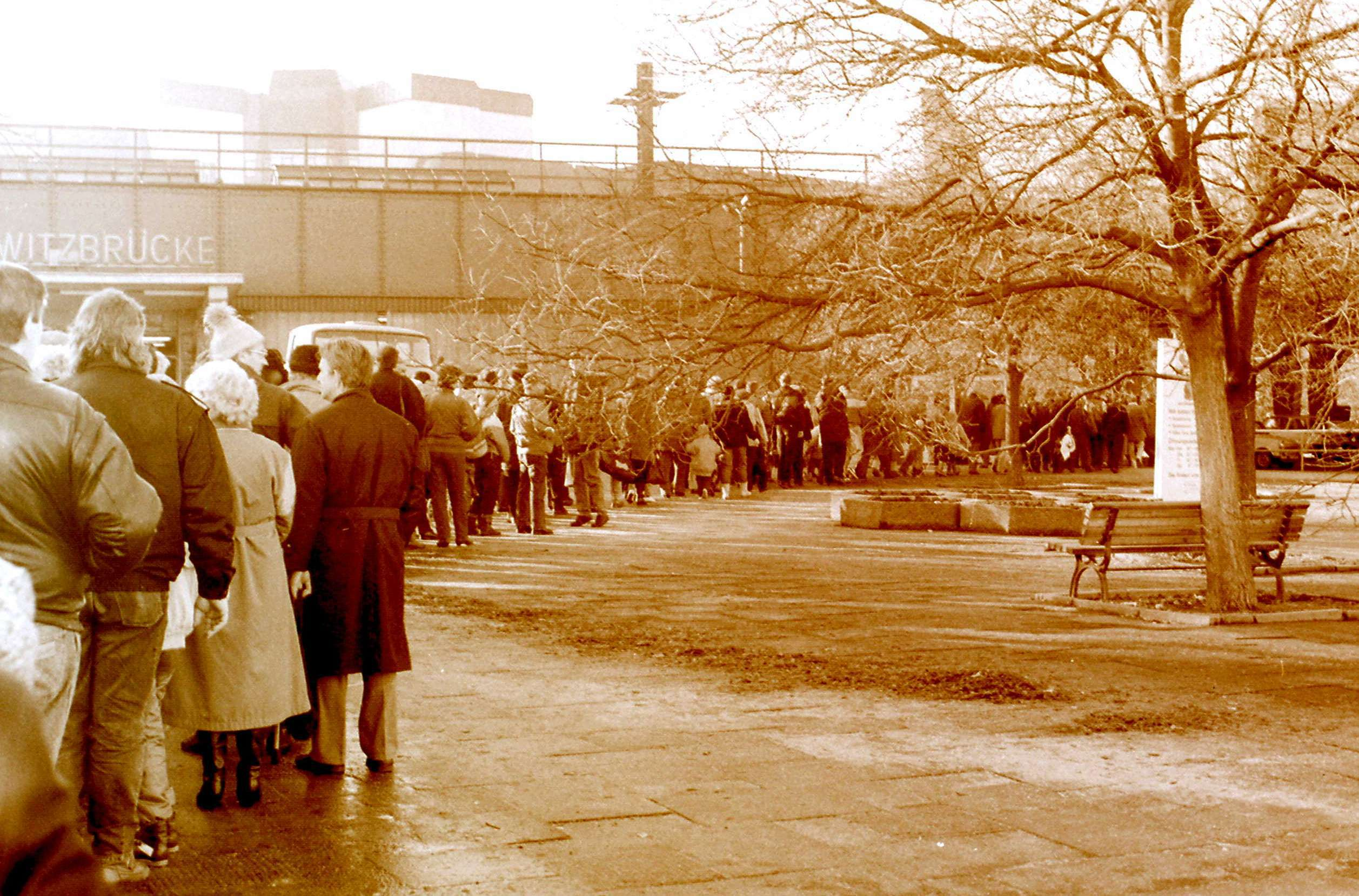 Eröffnung des U-Bahnhofs Jannowitzbrücke im Jahre 1989. Viele junge Menschen in der DDR sahen diesen U-Bahnhof zum ersten Mal in ihrem Leben.